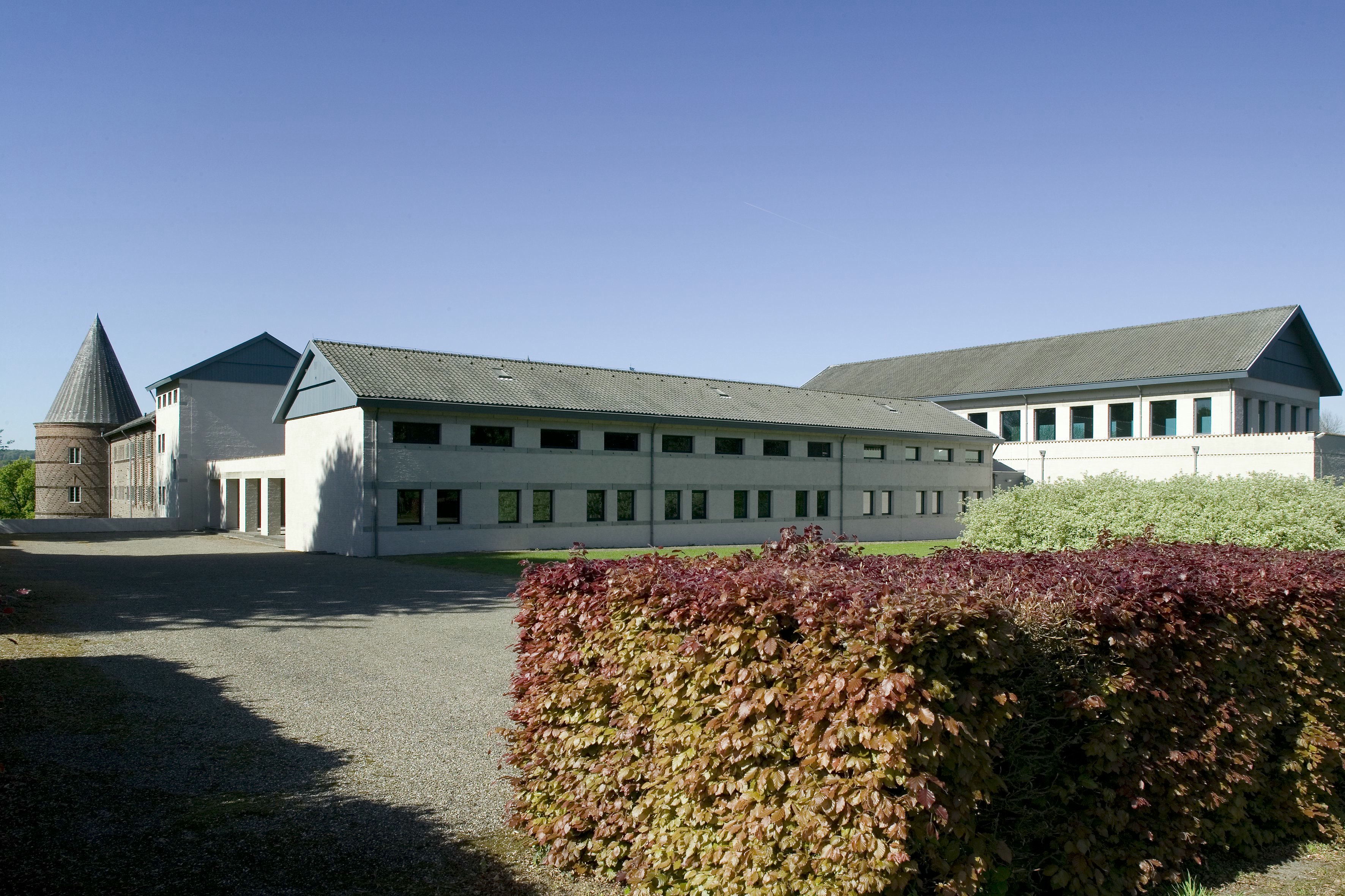 Sint Benedictusberg: Aanzicht op gevel van het nieuwe complex, vanuit het noordoosten